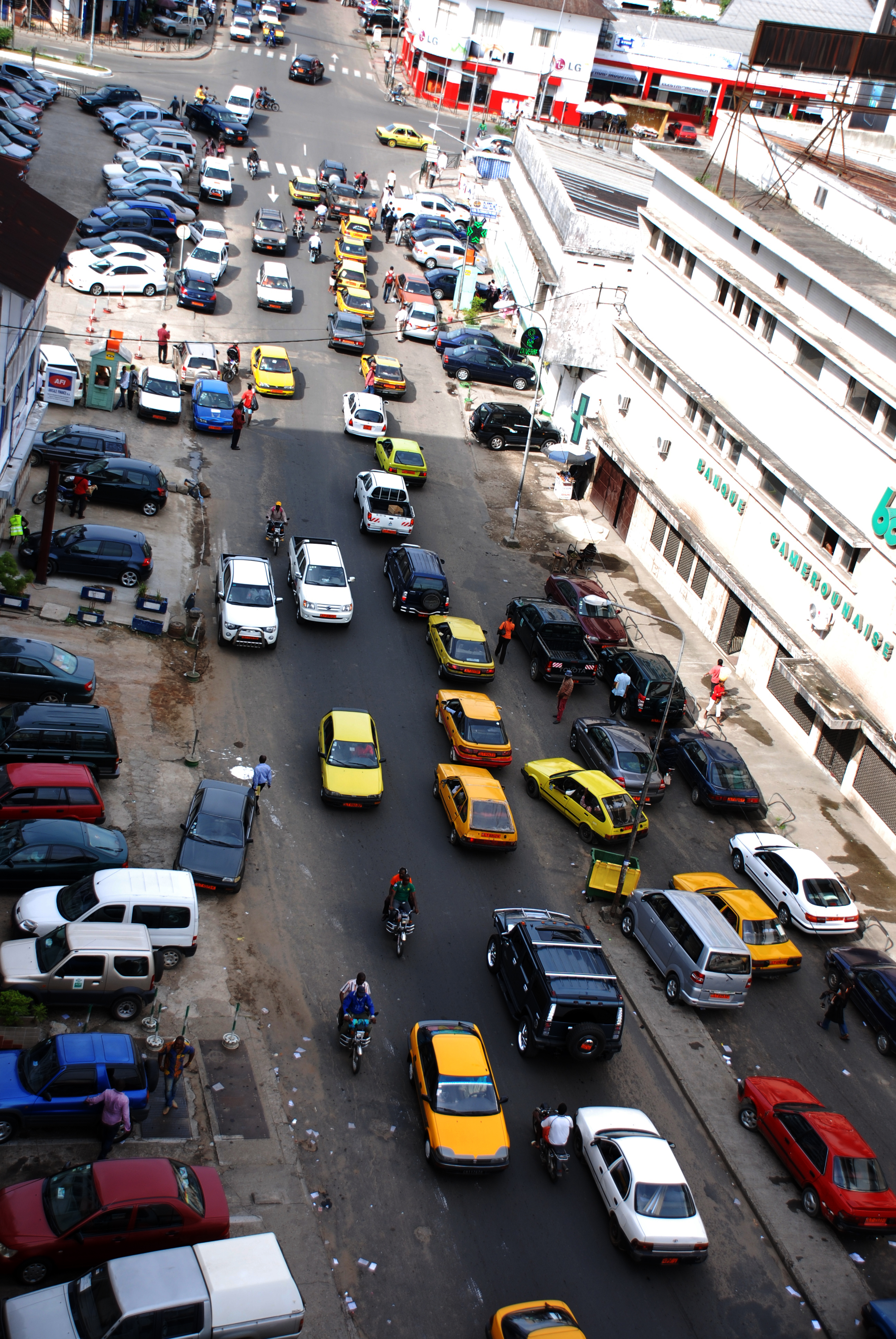 vue aérienne de la circulation dans les rues d’Akwa à Douala au Cameroun. This is an image with the theme "Africa on the Move or Transport" from: Cameroon